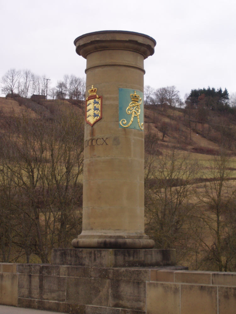 Säule auf der Brücke über die Jagst in Hohebach